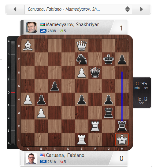 Canli oyun